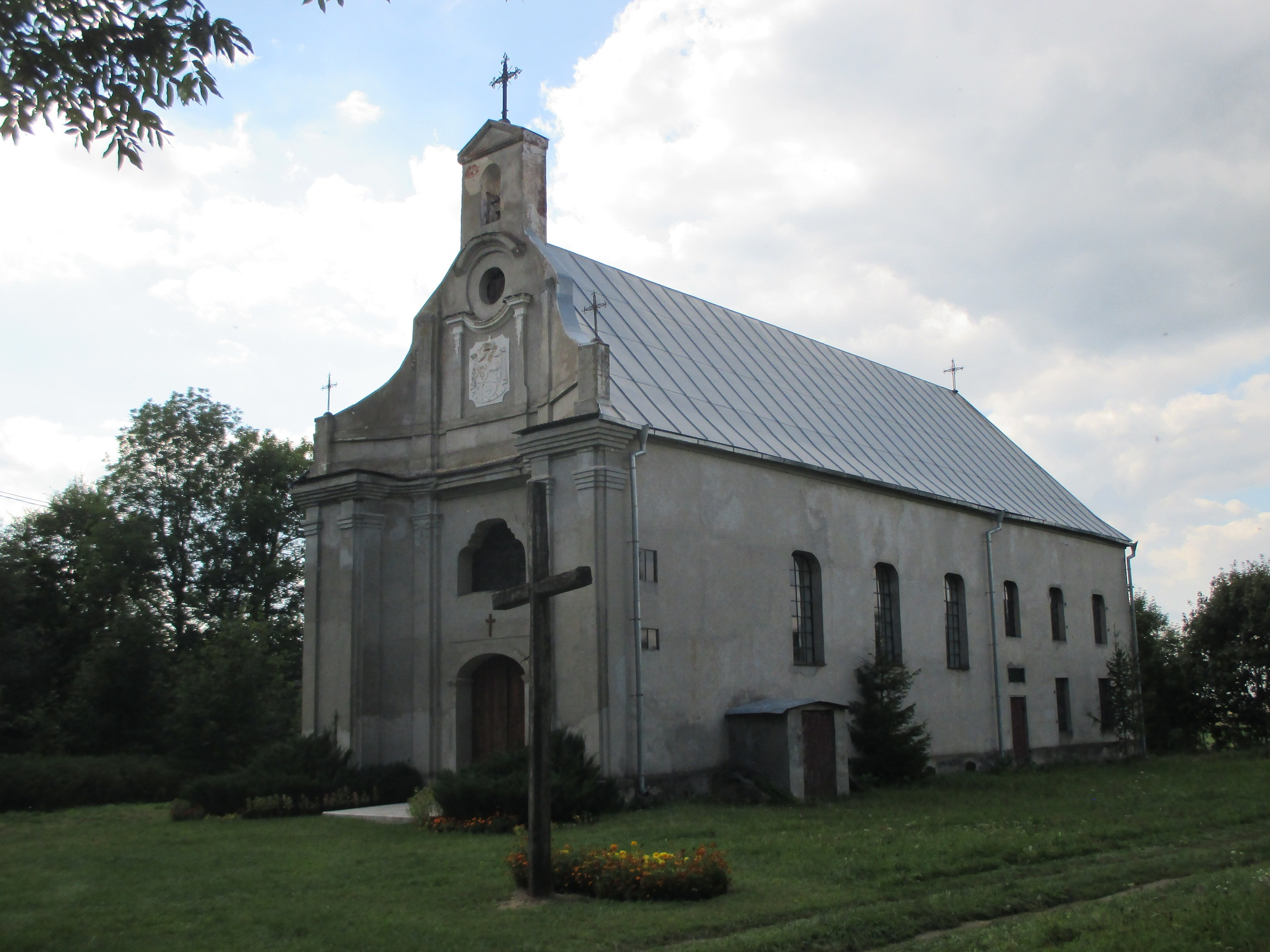 Пагародна, Воранаўскі раён. Капліца